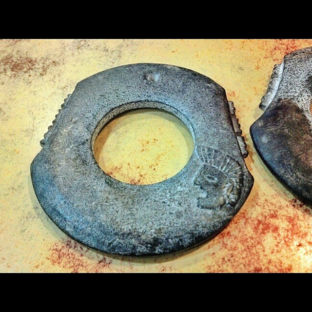 近來，跟深水埗茶餐廳老細學古玉。這是掛在胸前的玉環，環外有扉齒斑。一眼便知商代產物，小時看封神演義，伐紂全是長袍大袖的服務，原來3000 年前，商人如亞瑪遜部族一樣，像土人，沒有衣冠楚楚 chinese dress code in 3000 years age